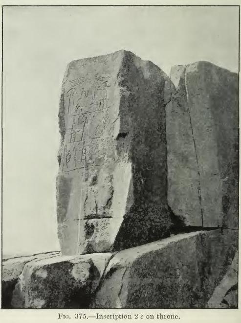 Inschrift Kızıldağ 3 beim Felsrelief von Kızıldağ nördlich von Karaman in der Südtürkei